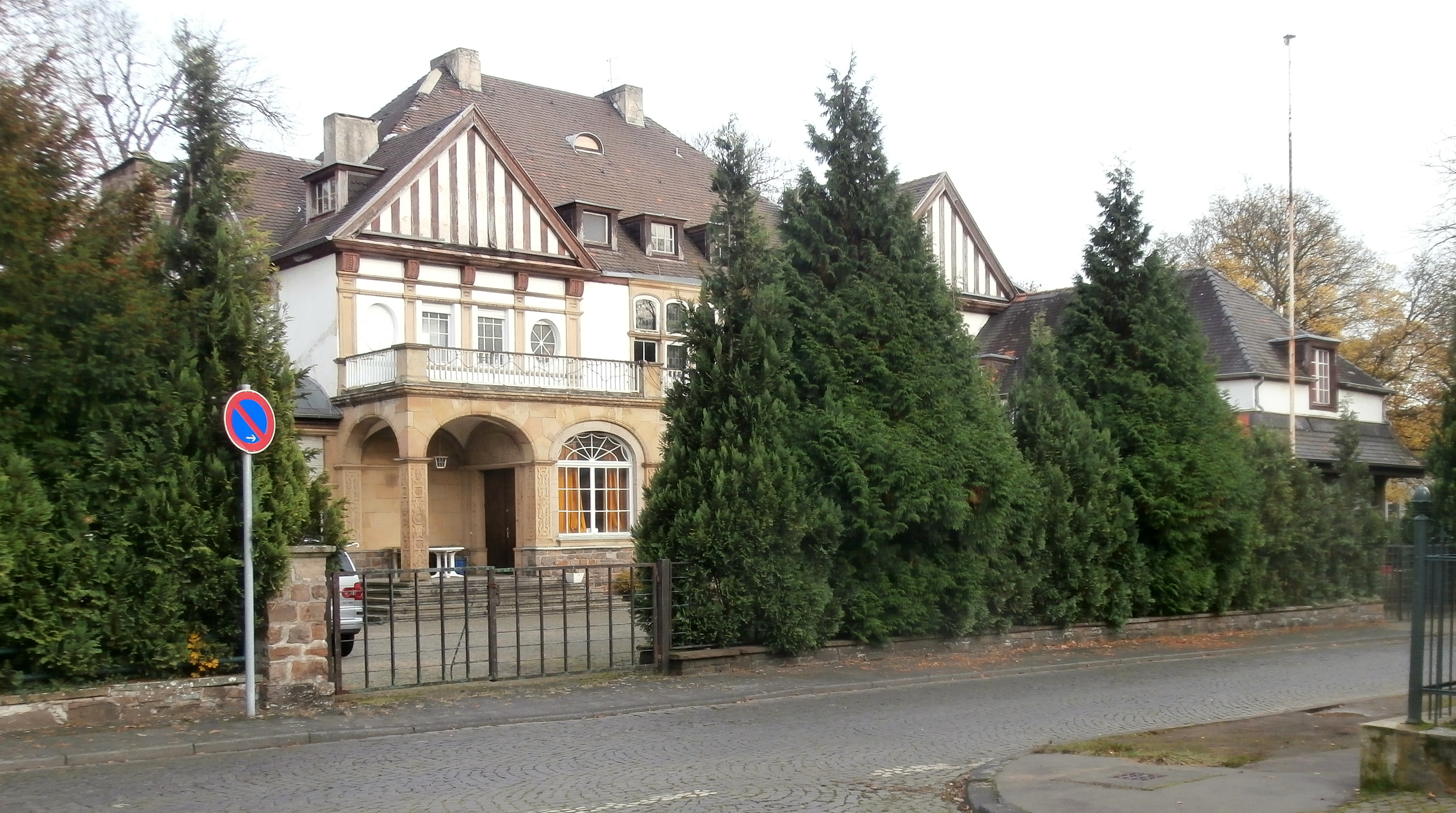 (Ehem.) Iran-Haus, Parkstraße 5, Köln-Marienburg